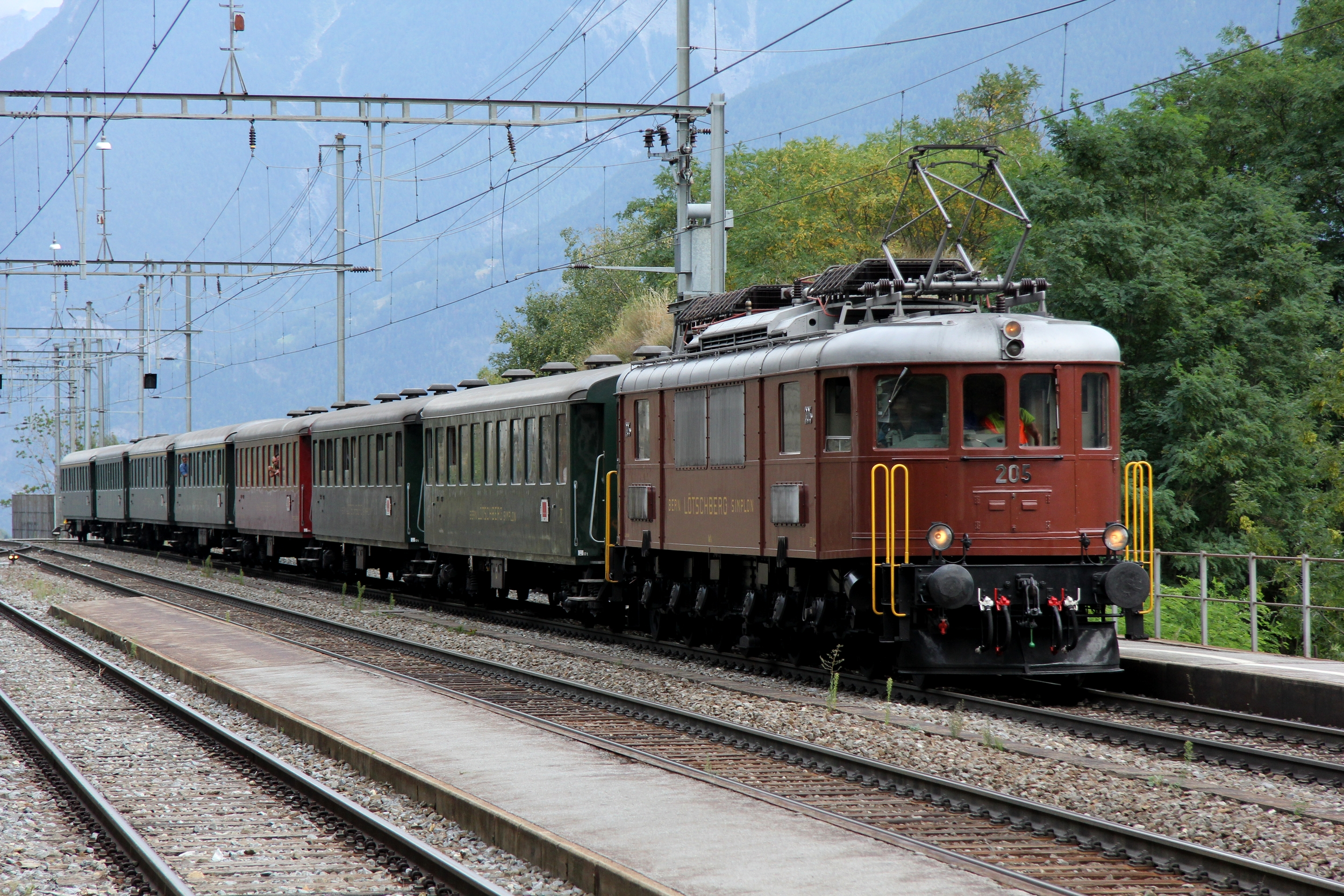 Die BLS Ae 6/8 205 (interne Nr. 95 63 0015 205-8, seither mit der offiziellen Nummer 91 85 4605 205-4 im NVR) an der Spitze des Extrazuges 30382 Brig–Goppenstein im Rahmen der Feierlichkeiten 100 Jahre Lötschbergbahn. Die Wagen sind von Swiss Classic Train.